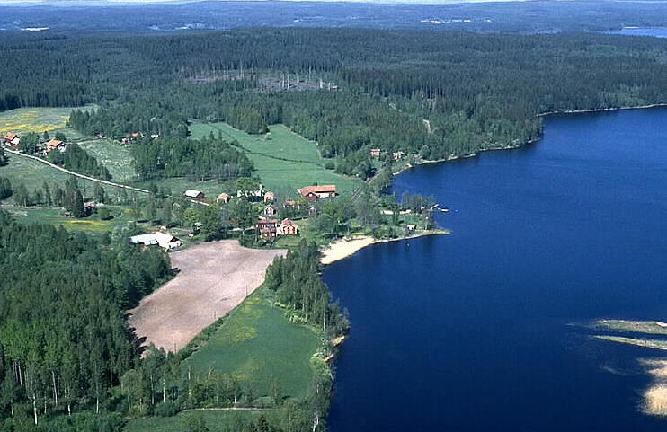 Motiv: Gamla Viker Nyckelord: Flygbilder, Riksintressen Kategori: BergslagsmiljöGamla Viker